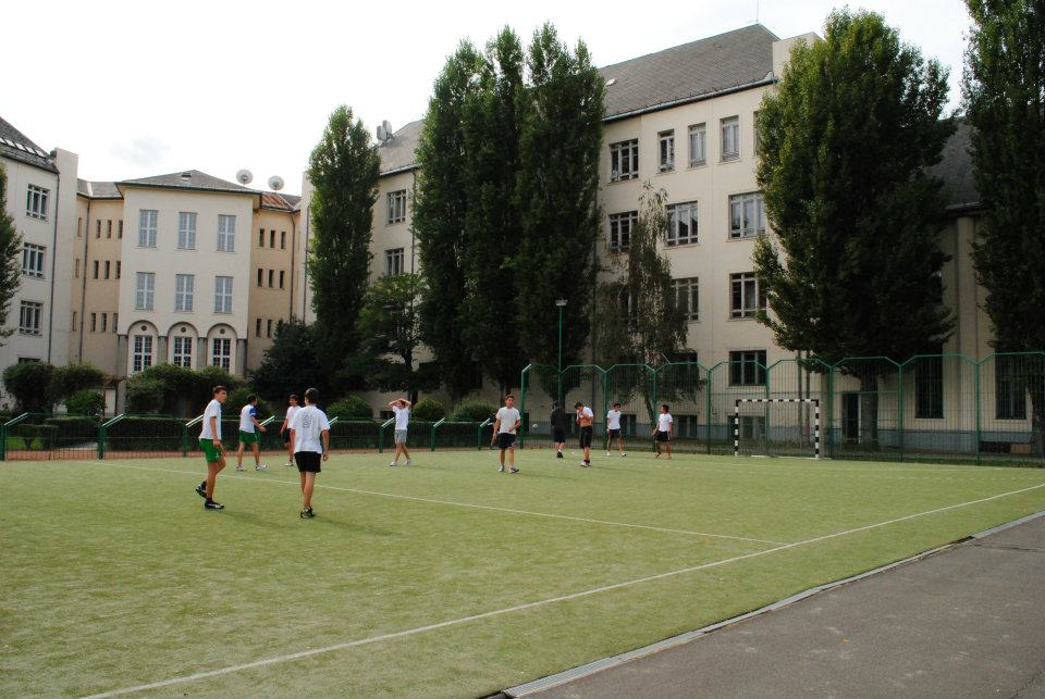 A kőbányai Szent László Gimnázium focipályája (Budapest)